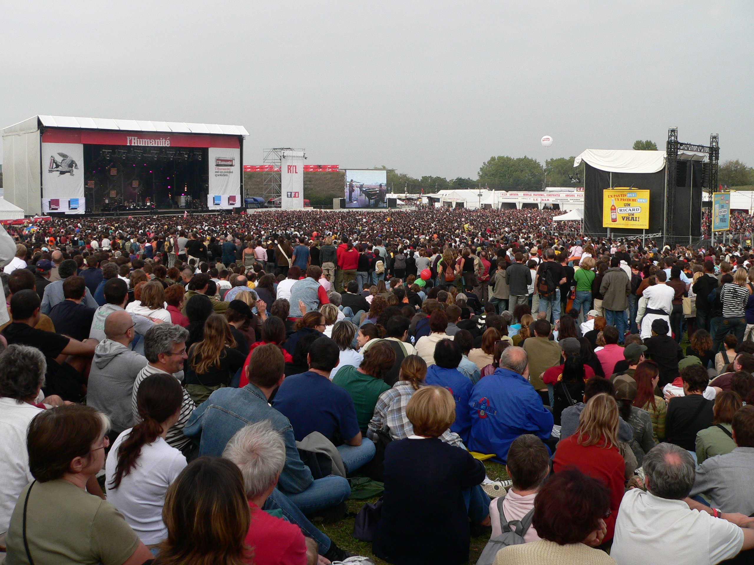 Fête de l’Humanité, 15 July 2006-17 July 2006